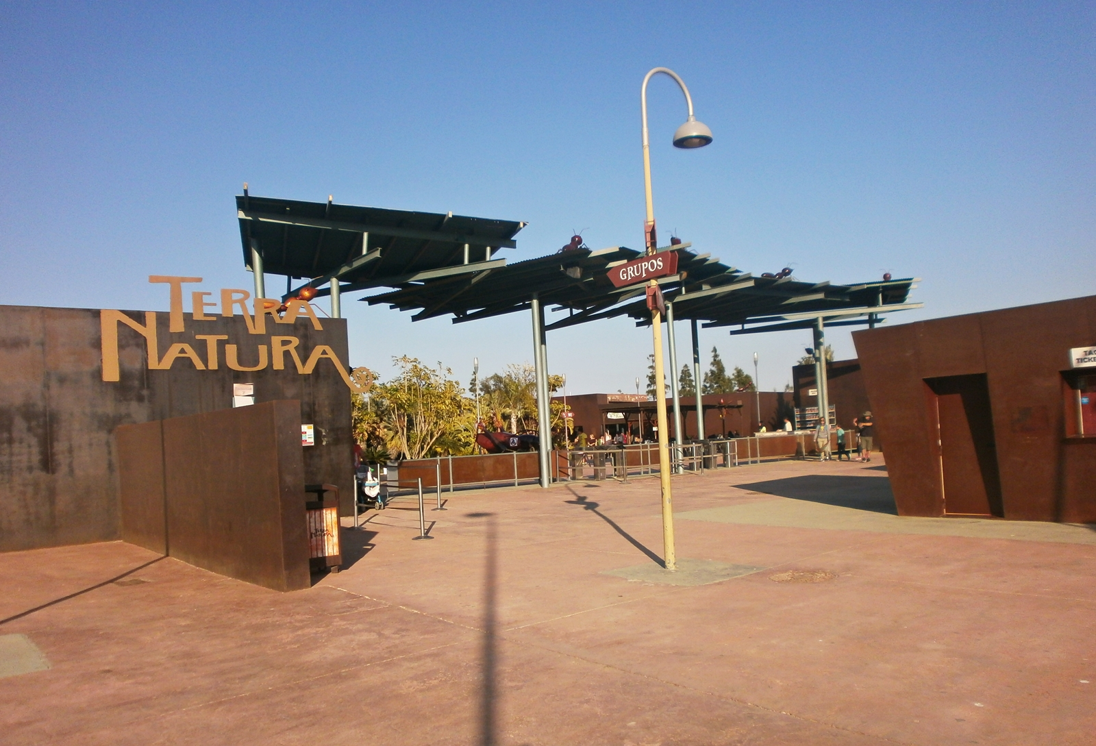 Vista de la entrada de Terra Natura. Benidorm, Alicante, España.